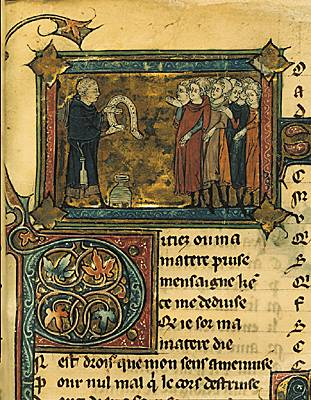 Miniature datant du XIIIe siècle extraite d'un recueil de poésies de Jehan Bodel et qui le représente (homme tenant un texte dans ses mains). Miniature de la Bibliothèque nationale de France, à Paris.